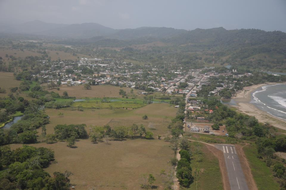 vista aerea de acandi tomada desde el lado sur